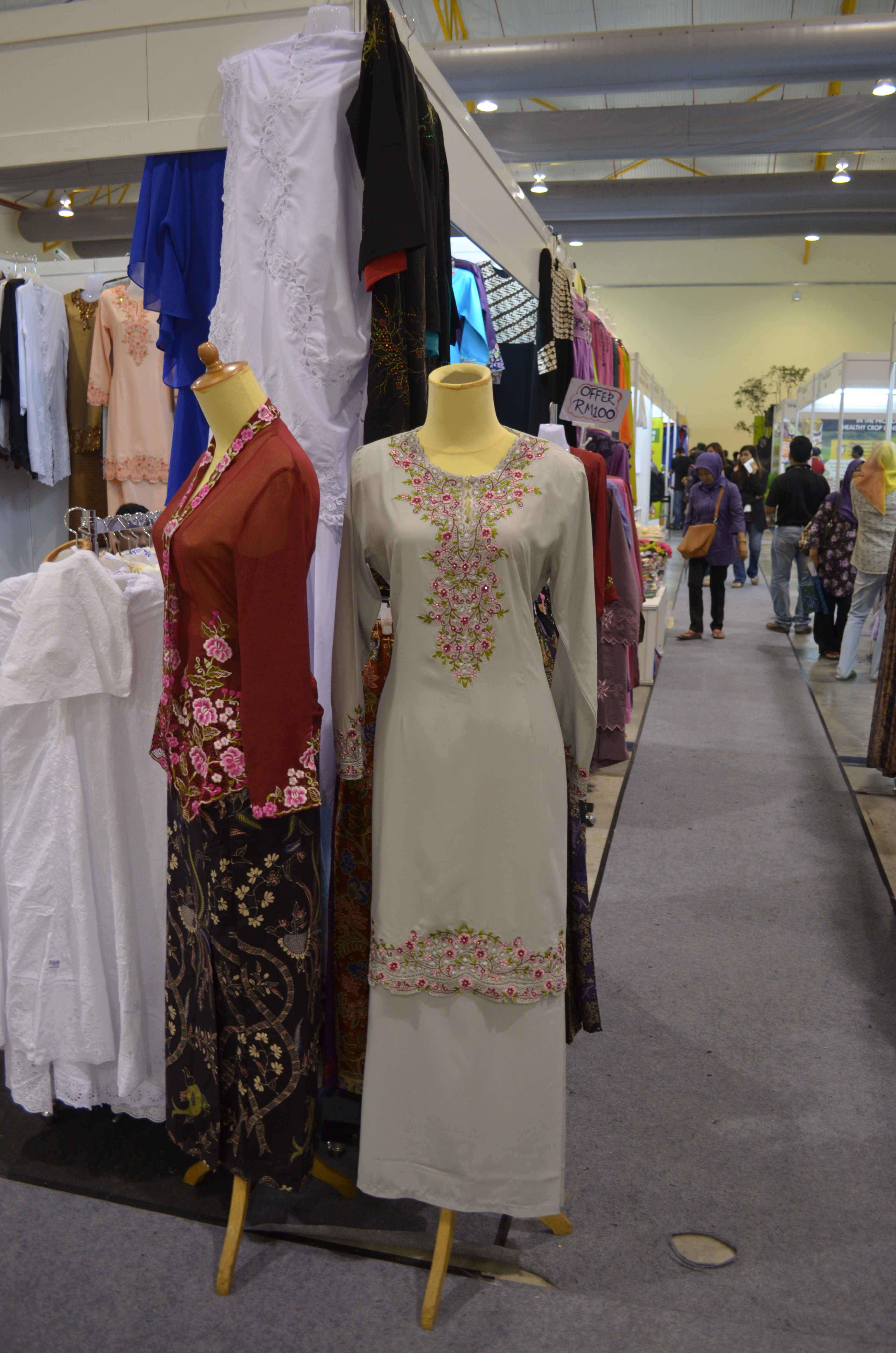 Baju kurung Melayu.